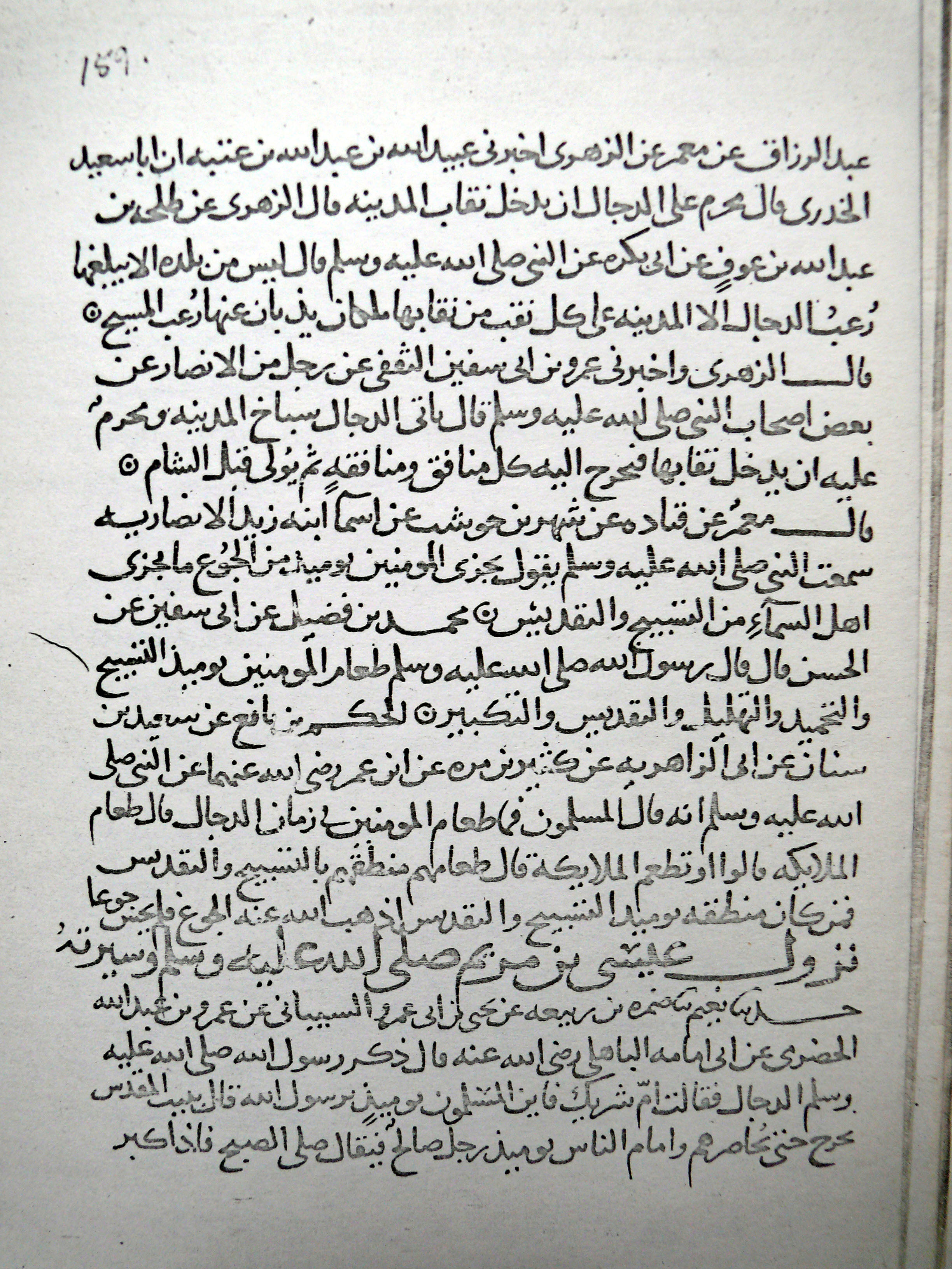 Reproduktion eines Blattes aus einer arab. Handschrift aus dem 14. Jahrhundert